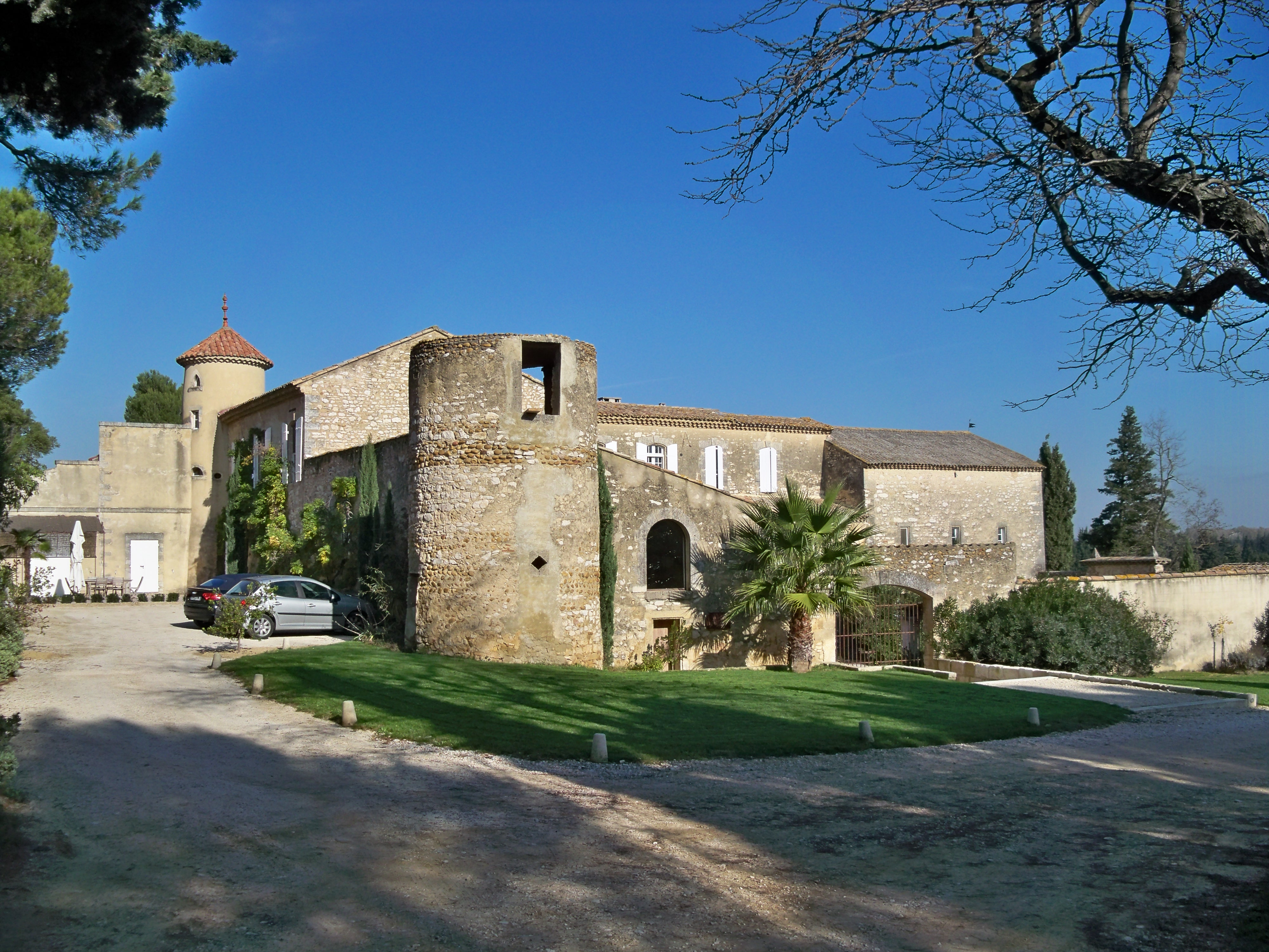 Prieuré de Montézargues, Tavel (30)